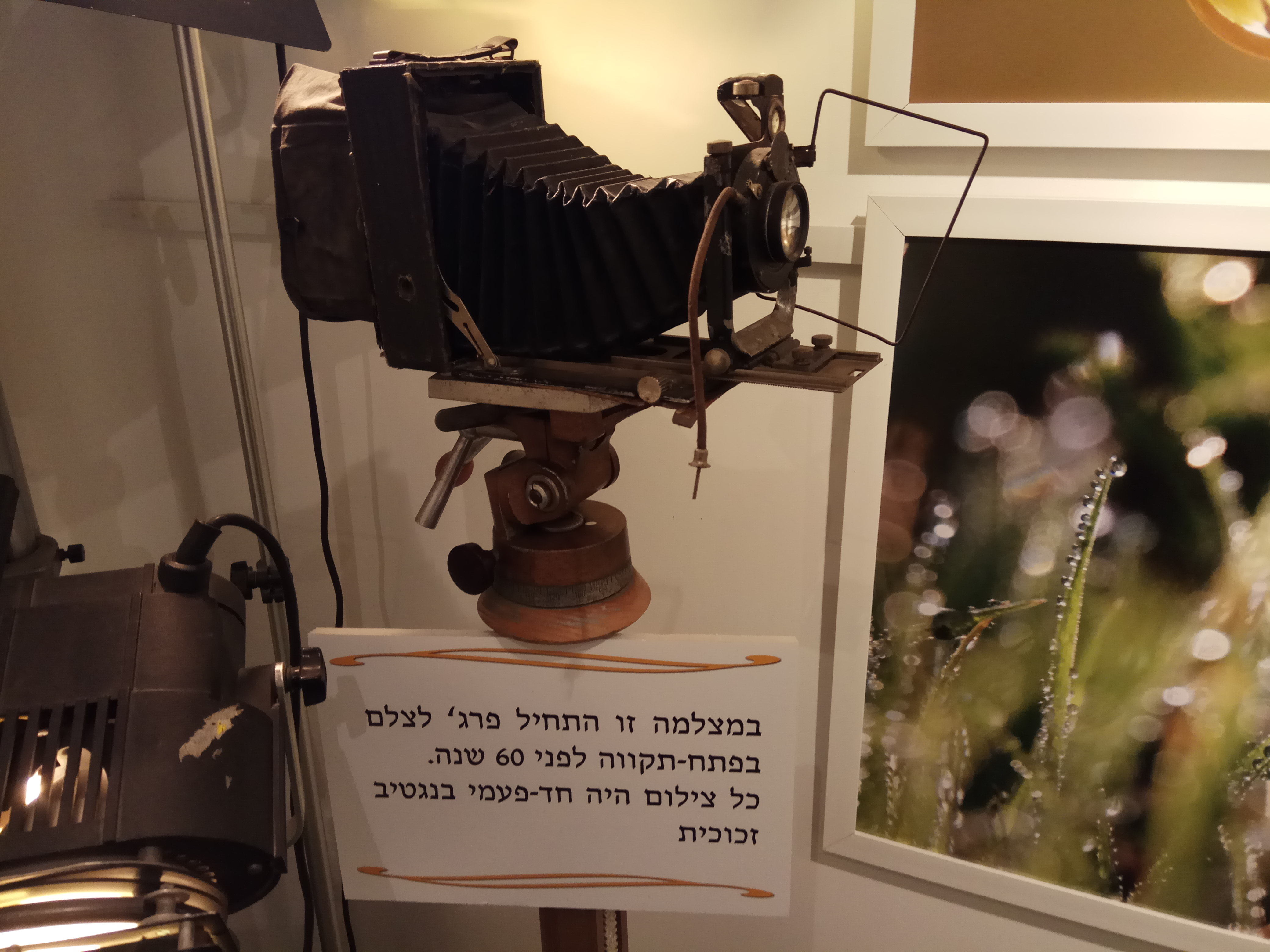 המצלמה הראשונה של פרג' פרי בישראל